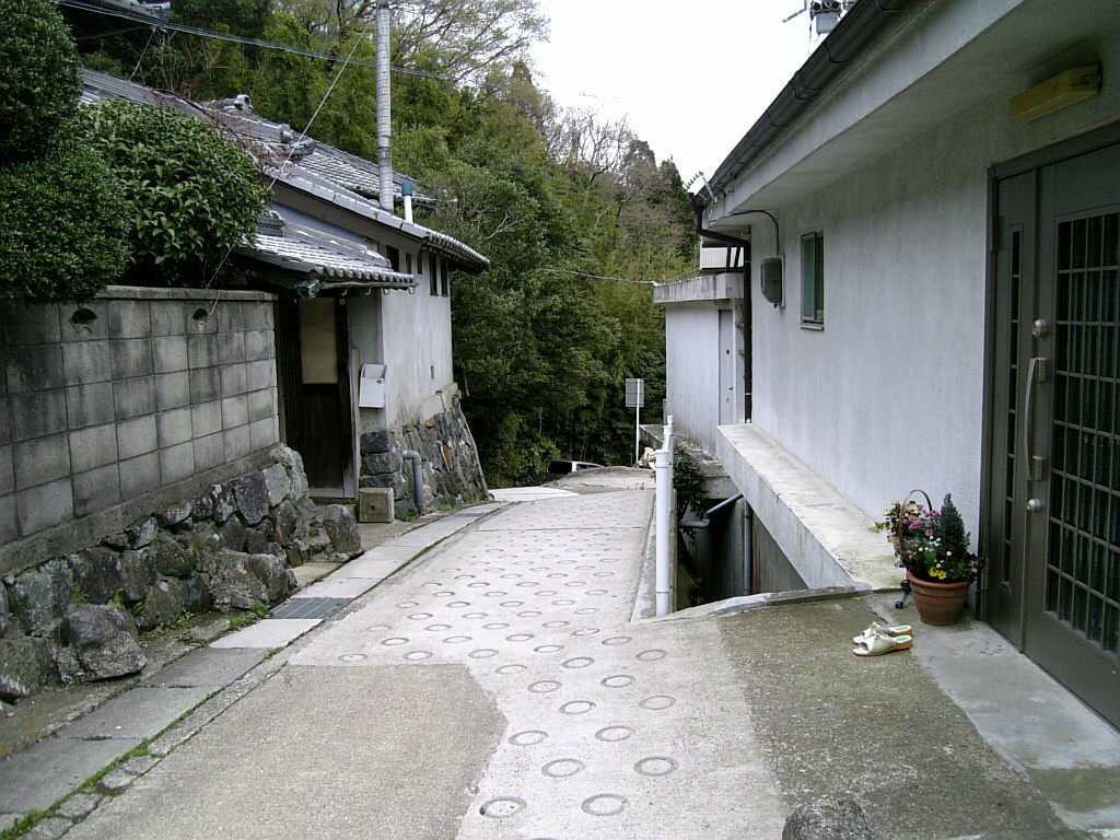 国道308号（暗越奈良街道）生駒市西畑町にて。